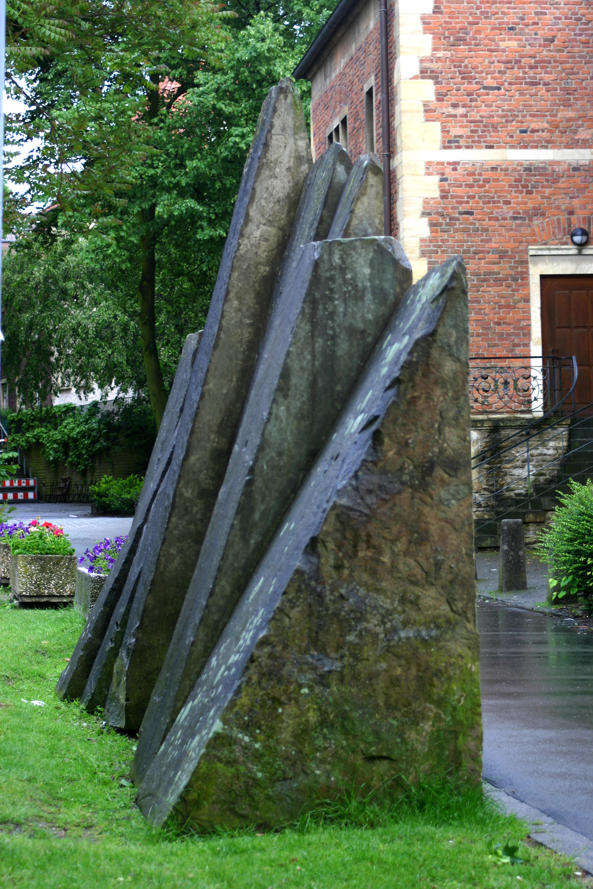 Ulrich Rückriem - Dolomit zugeschnitten - 1977 - Standort: Petrikirche, Jesuitengang